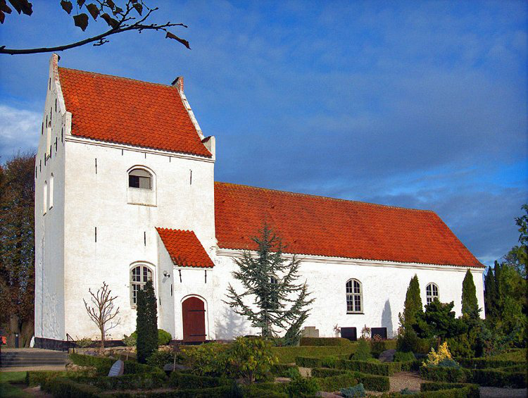 fra sydvest